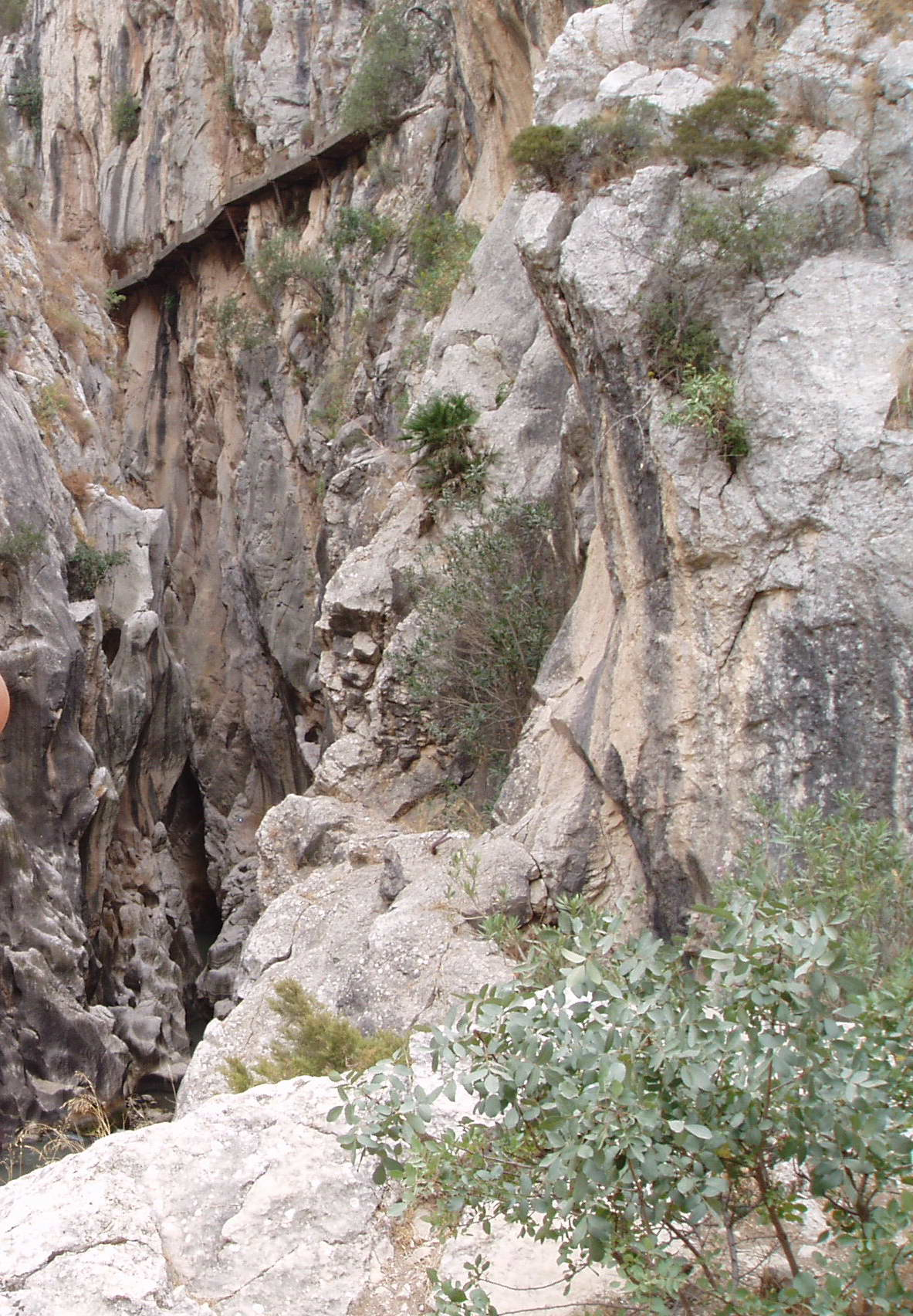 Acceso norte al Desfiladero de los Gaitanes